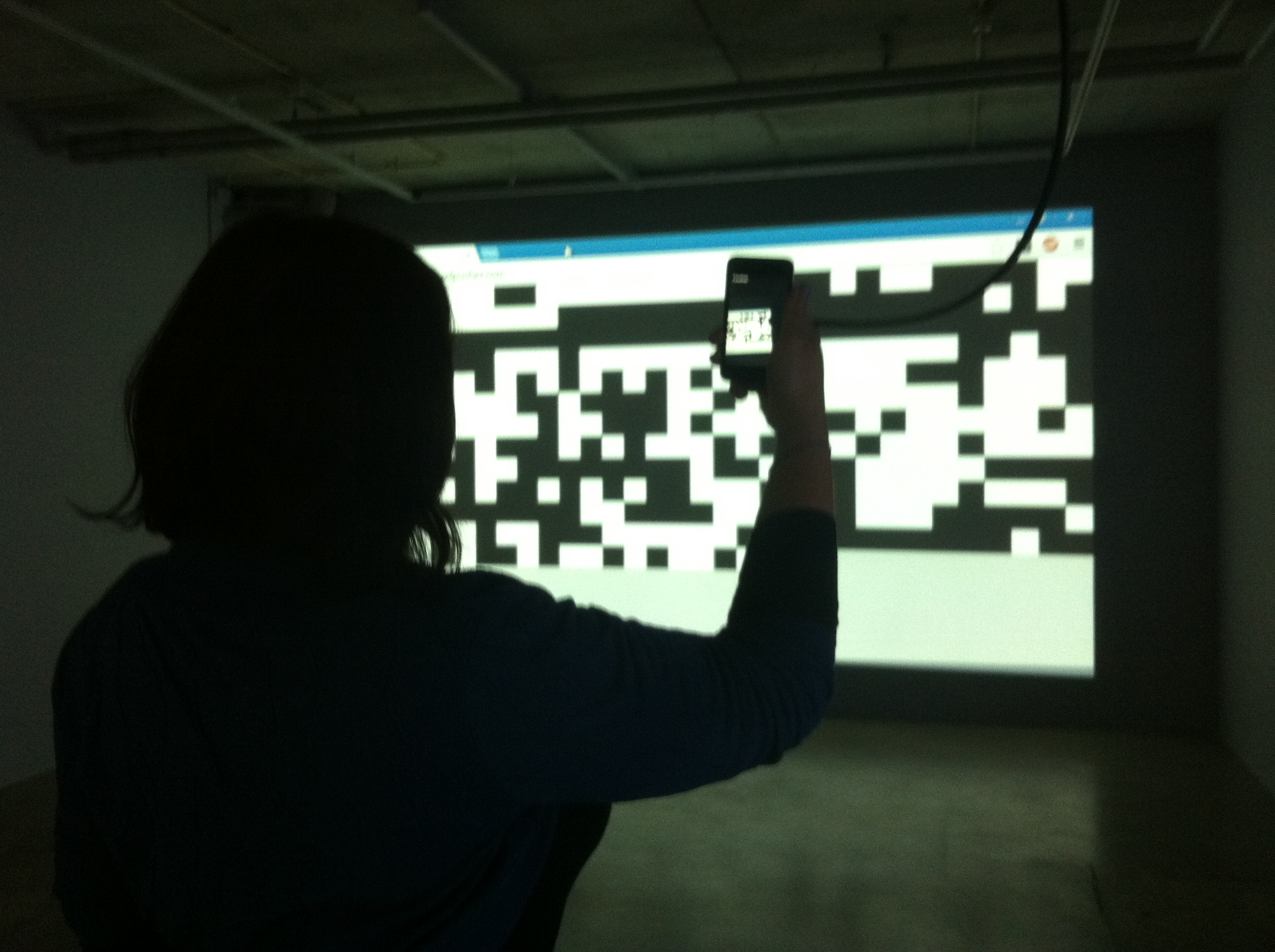 JODI Home/Go Home - MAMA: Showroom for Media Intemama5rnetpioniers Joan Heemskerk & Dirk Paesmans zaten in de kopgroep van kunstenaars die in de jaren negentig het internet op gingen. Het wereldwijde web bleek nieuwe mogelijkheden te bieden aan de hedendaagse kunstenaar. Het was een platform met een potentieel enorm groot publiek. Bij Showroom MAMA is de expositie JODI het begin en het eind van de keten waarvan de interactie via internet de uiteindelijke vorm van het werk gaat bepalen. De basis is het materiaal bij MAMA maar iedereen kan reageren, meedenken, suggereren. Nu lijkt het nog alsof ze met de grote voorjaarsschoonmaak bezig zijn, maar dat wordt allemaal anders. Hoe anders, dat zal het interactieve/creatieve proces bepalen. kunstwerk in ‘twotone’ Een groter contrast is nauwelijks denkbaar. Eén ruimte is licht, rommelig en maakt een ongeorganiseerde indruk. De andere ruimte is strak, zwart-wit, leeg. Op de wand van de verduisterde tweede ruimte van MAMA zijn vier banen met pixels geprojecteerd. Met een ipod aan een snoer kan je pixels ‘gooien’. De zwarte of witte blokjes worden toegevoegd aan de reeks en zo ontstaat een kunstwerk in ‘twotone’. Op internet kan je de vorderingen volgen op